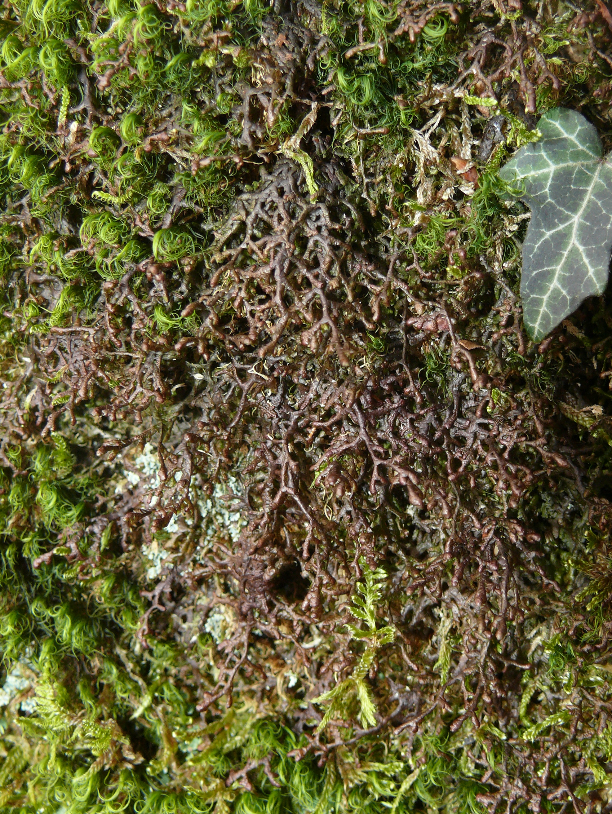 Frullania tamarisci, Schwäbisch-Fränkische Waldberge, Germany